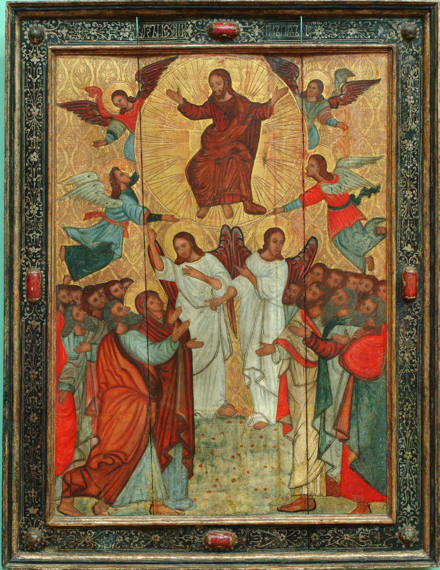 Абраз Узнясенне са Стэфанаўскай царквы са Слуцка